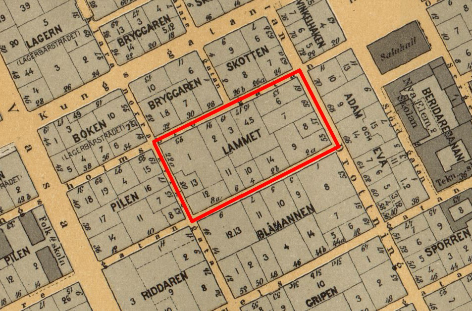 Kvarteret Lammet på Norrmalm i Stockholm